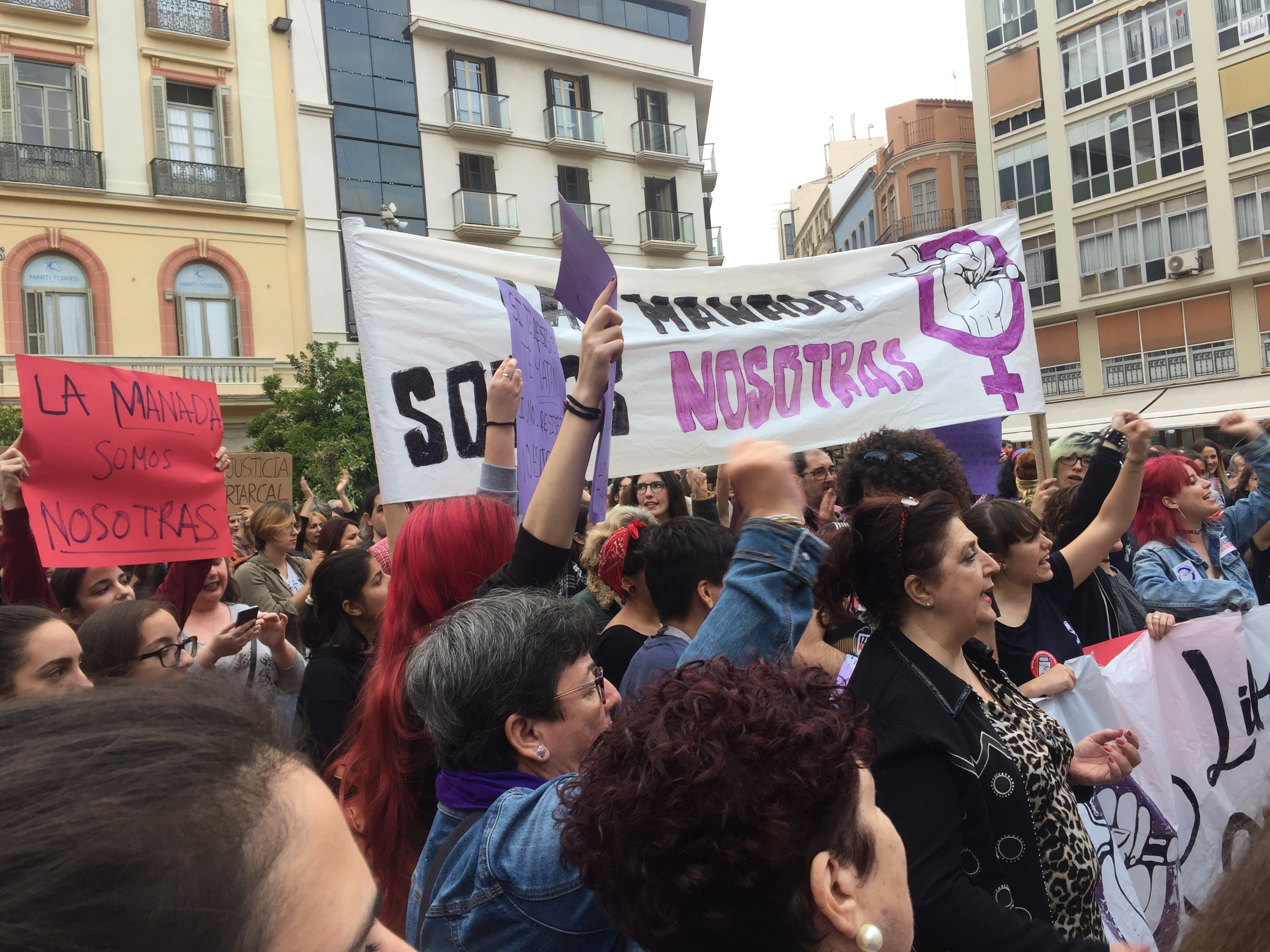 Protestas en las calles de Málaga por la sentencia en el Caso La Manada.